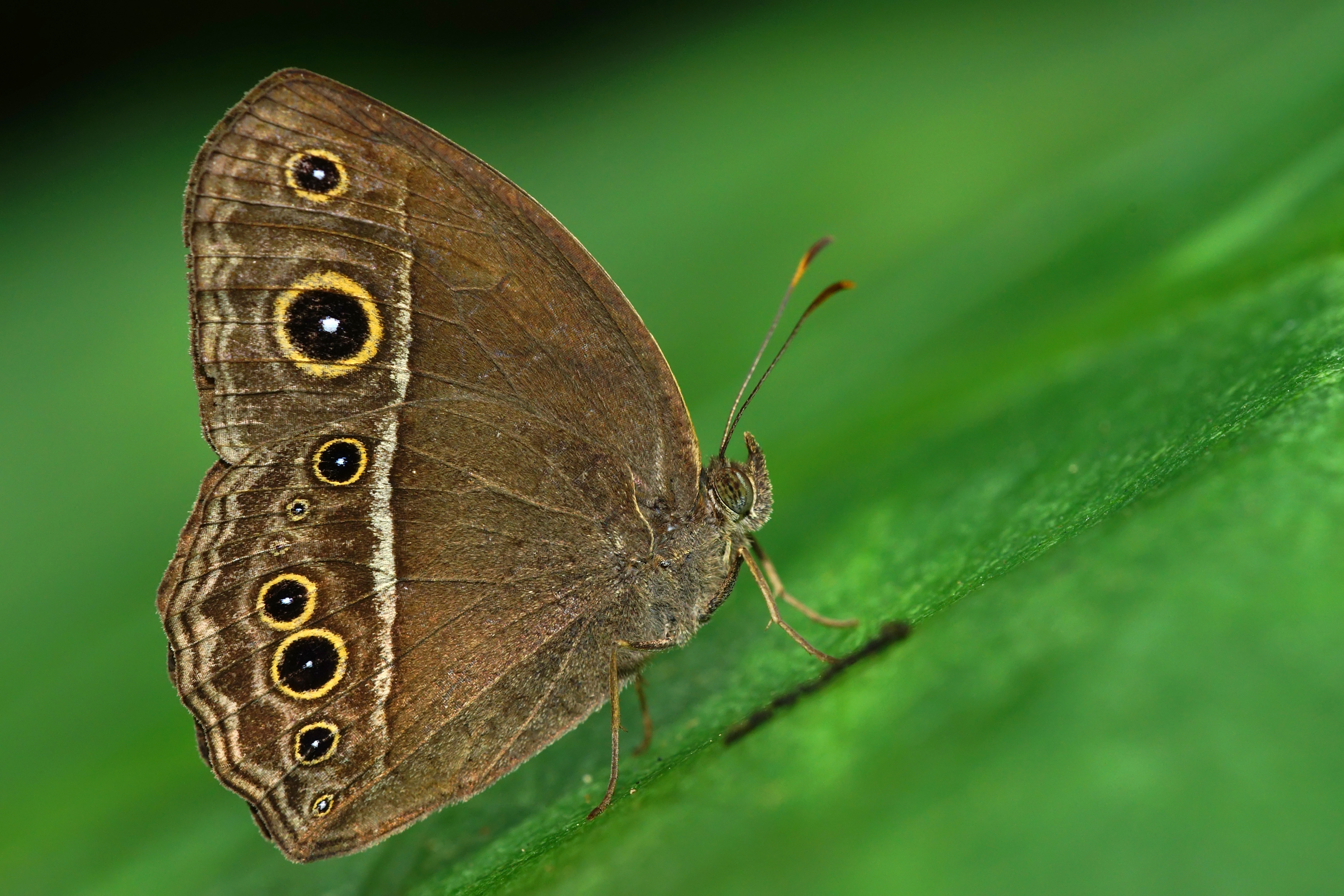 中文（台灣）: 切翅眉眼蝶 Mycalesis zonata